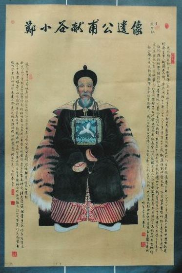 这是清代出现的郑献甫画像，早已进入公共领域。